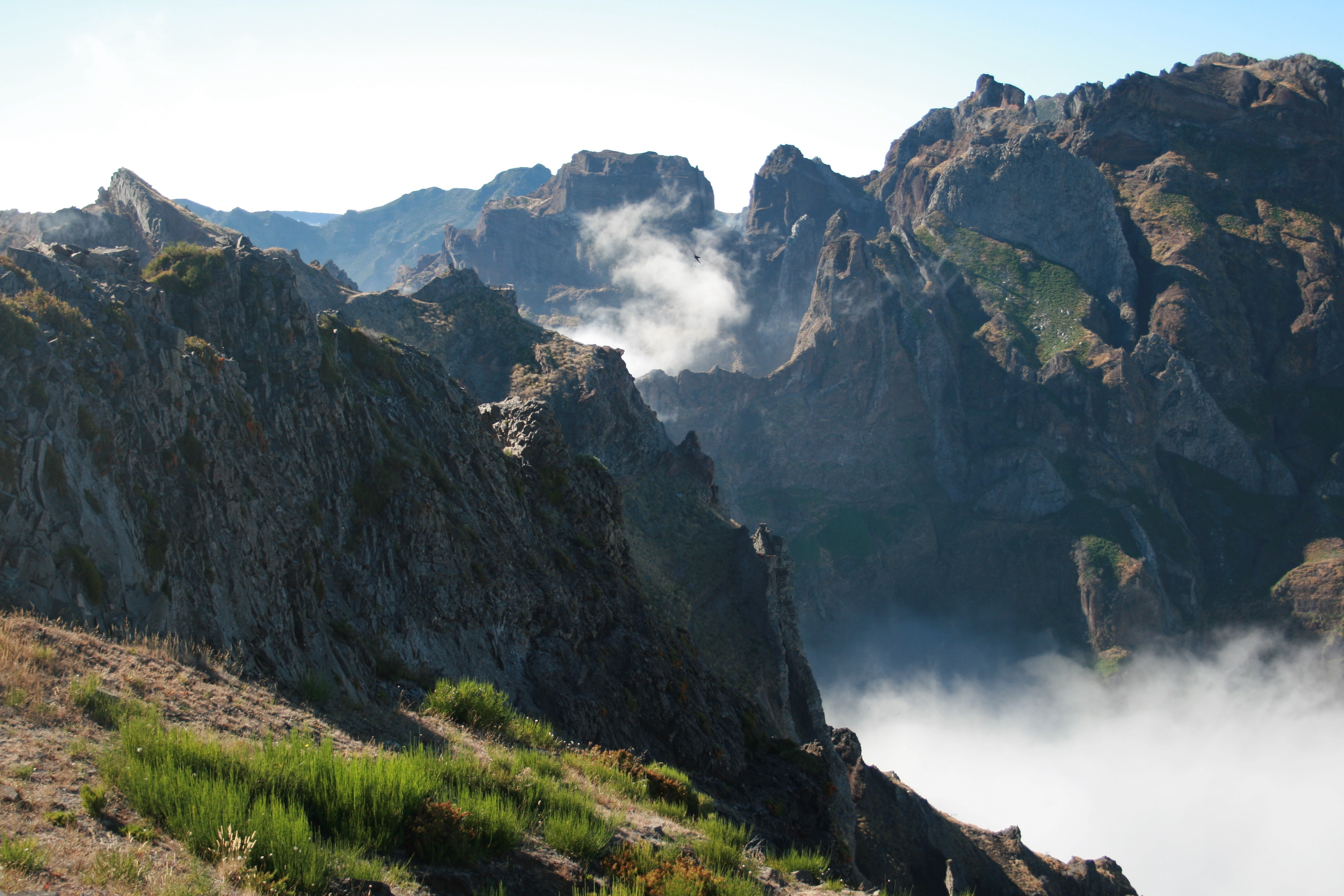 Brutgebiet des Madeira-Sturmvogels nahe dem Pico do Areeiro auf Madeira.